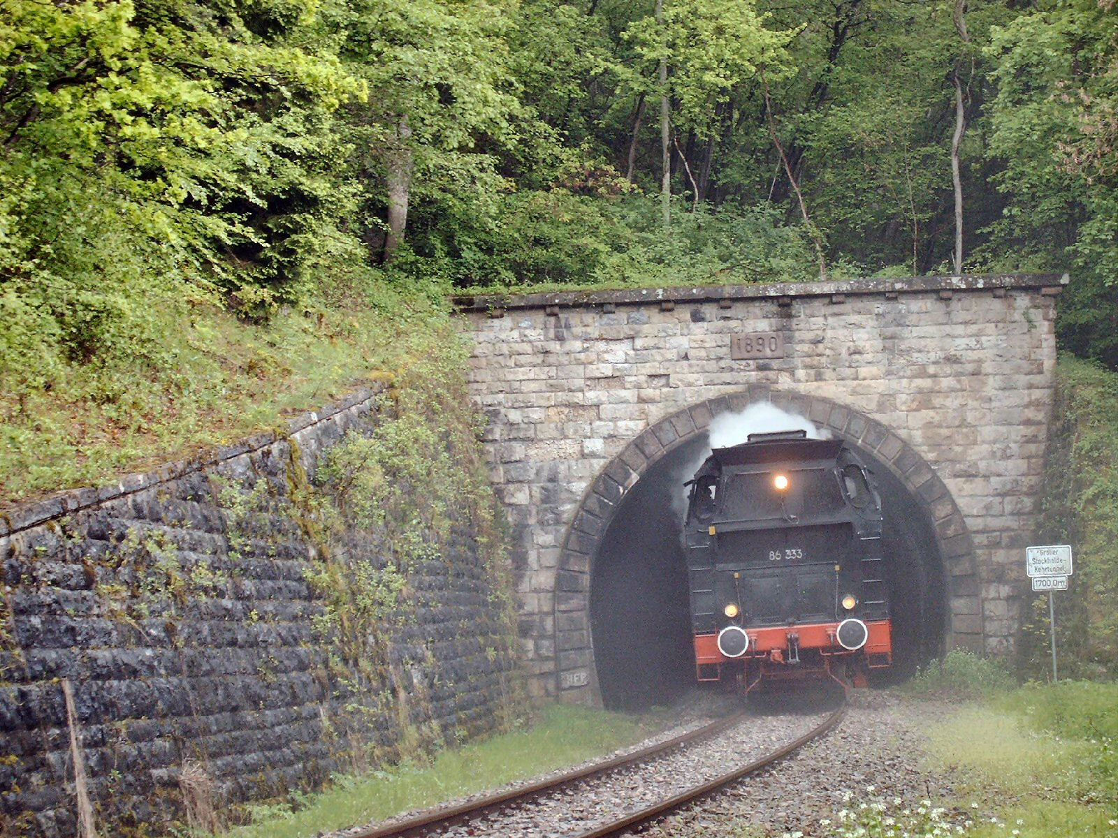 Wutachtalbahn: Zug auf Talfahrt bei der Ausfahrt aus dem Stockhalde-Kreiskehrtunnel.